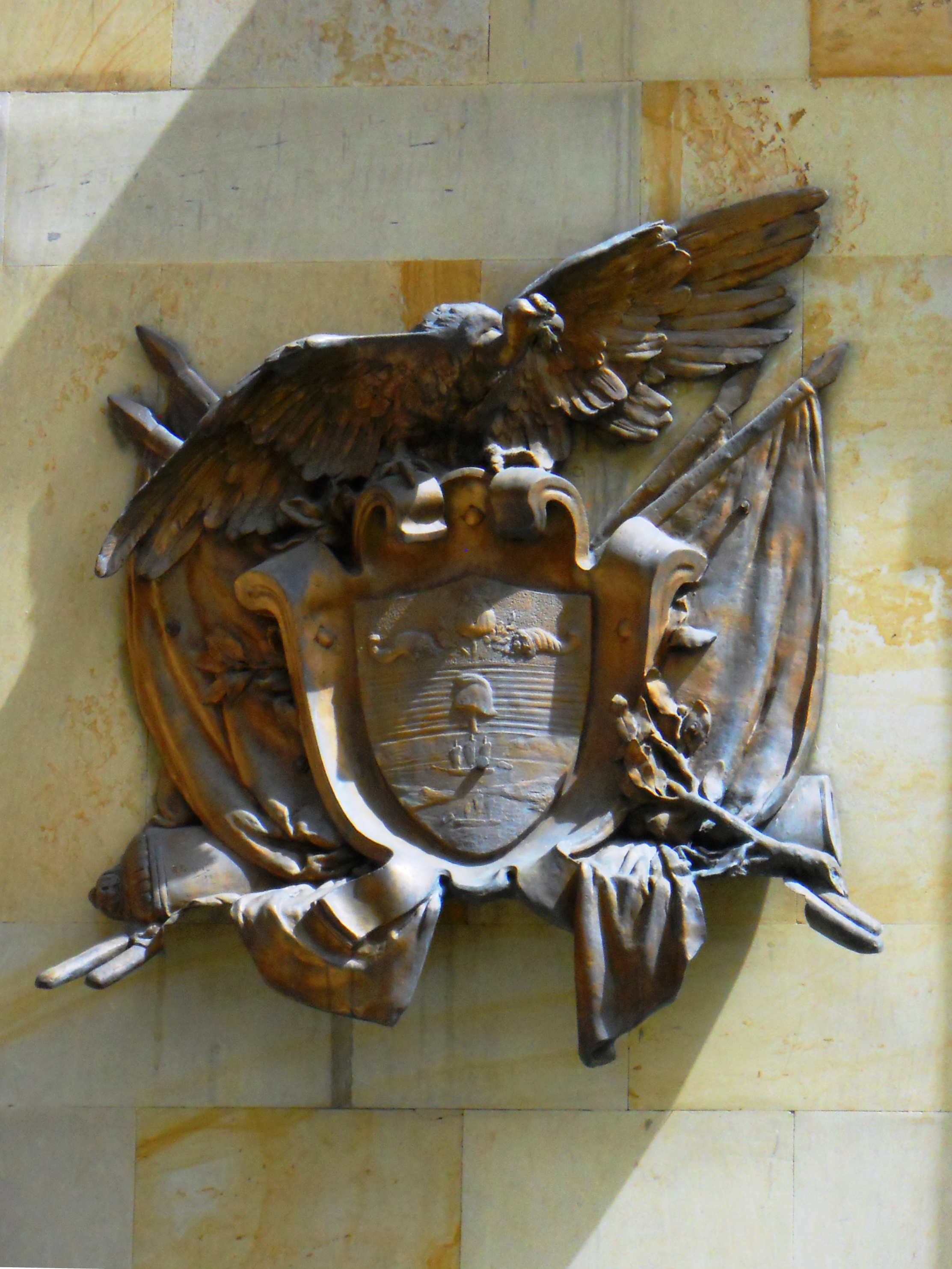 Escudo en altorrelieve a la entrada de la Academia Colombina de la Lengua, en Bogotá.